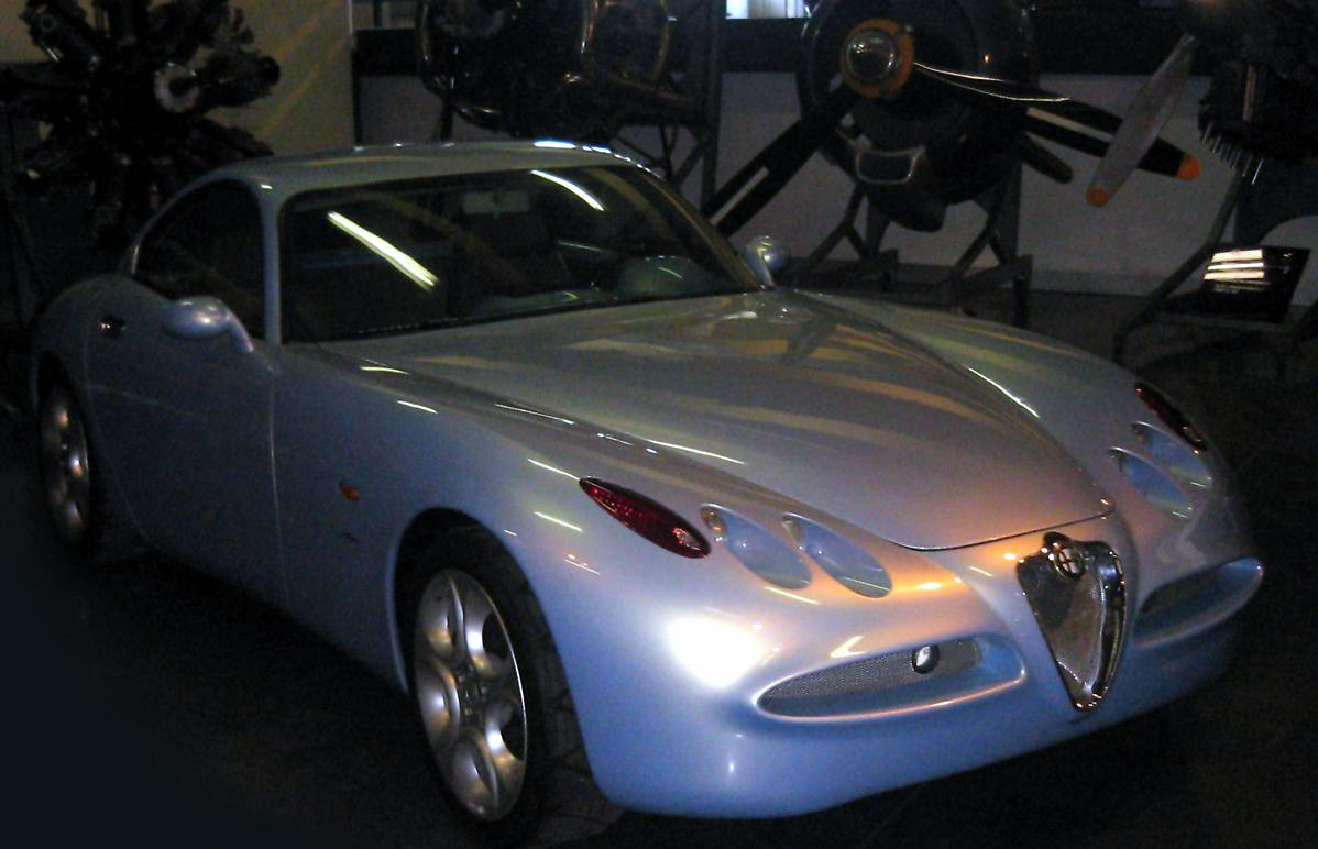 Alfa Romeo Nuvola